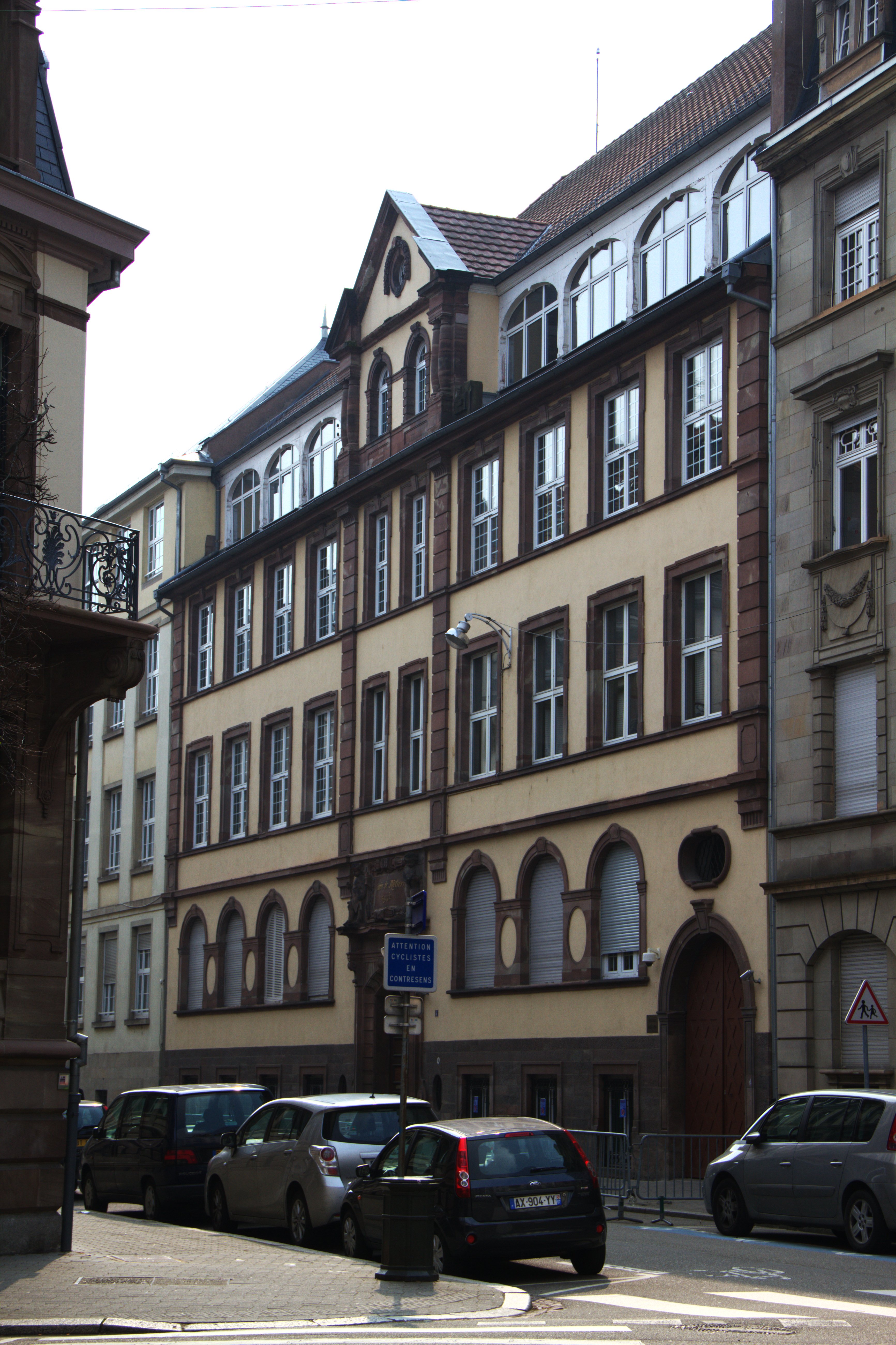 4, rue Baldung Grien à Strasbourg, ancien siège de la Chambre des métiers d’Alsace, occupé actuellement par l’école Aquiba.